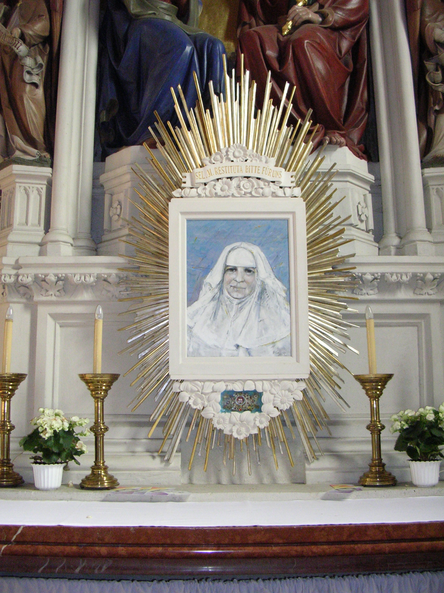 Maria Restituta in der Brigittakirche, Wien-Brigittenau